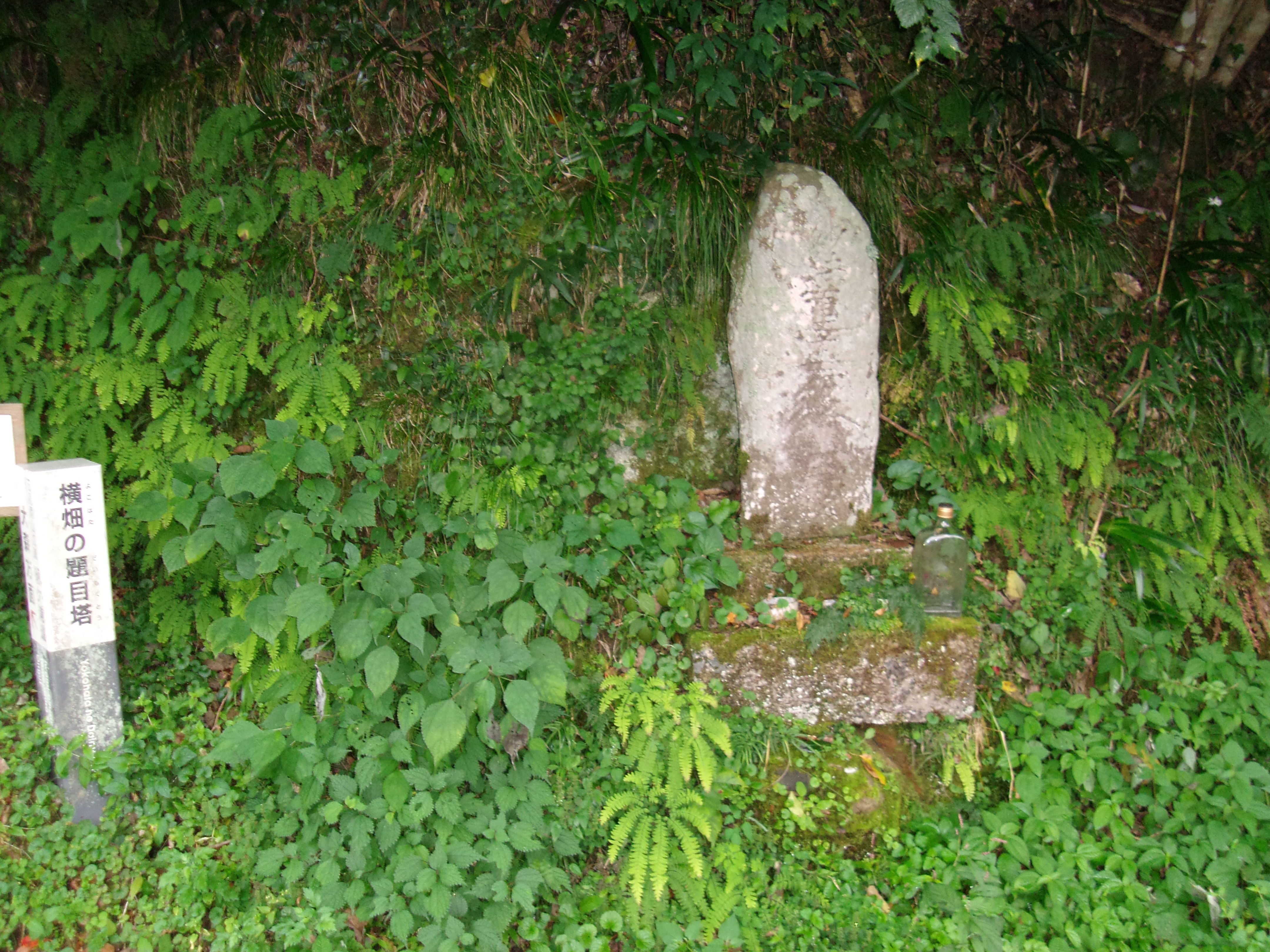 世界遺産「石見銀山」の構成資産である銀山街道鞆ヶ浦道 横畑の題目塔